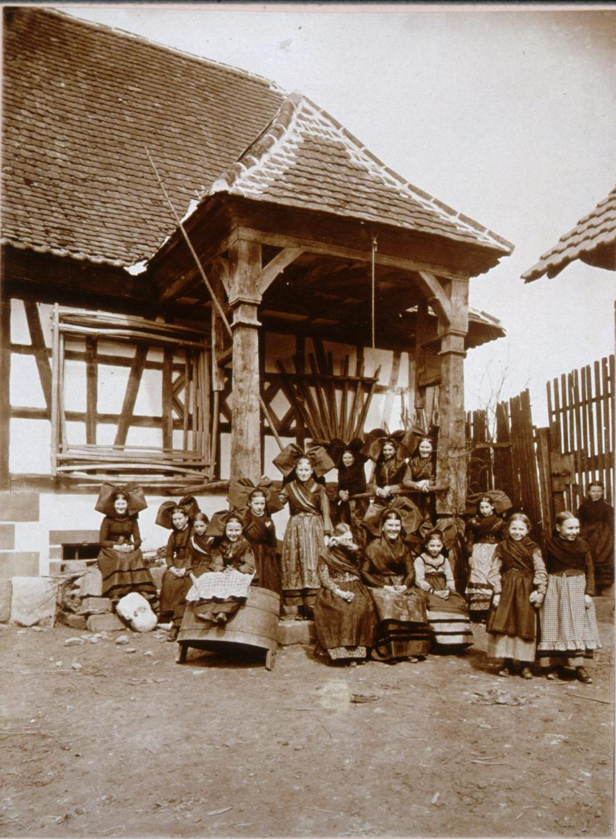 Groupe de femmes dans une cour de ferme à Buswiller en Alsace